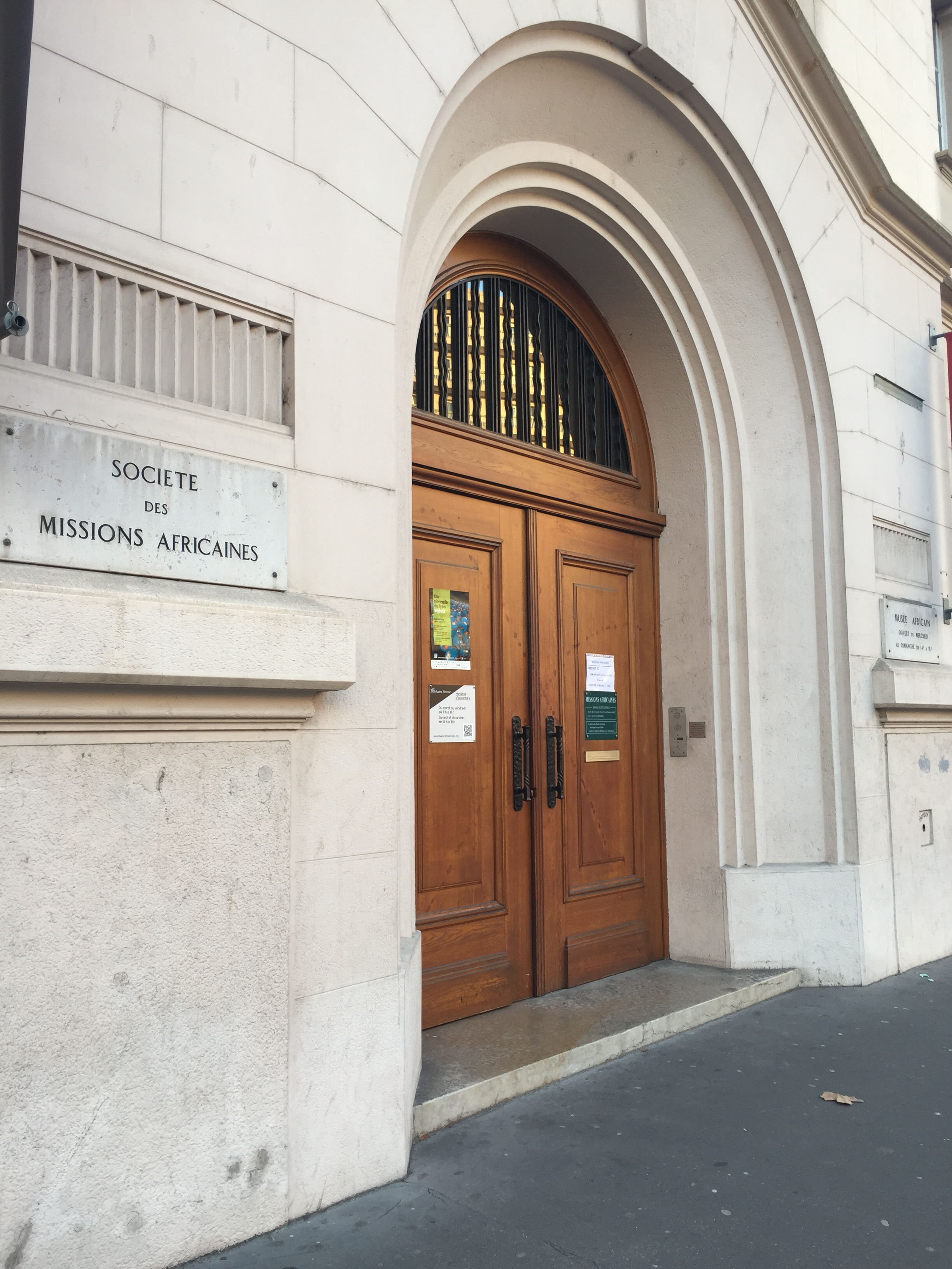 Musée africain de Lyon - entrée